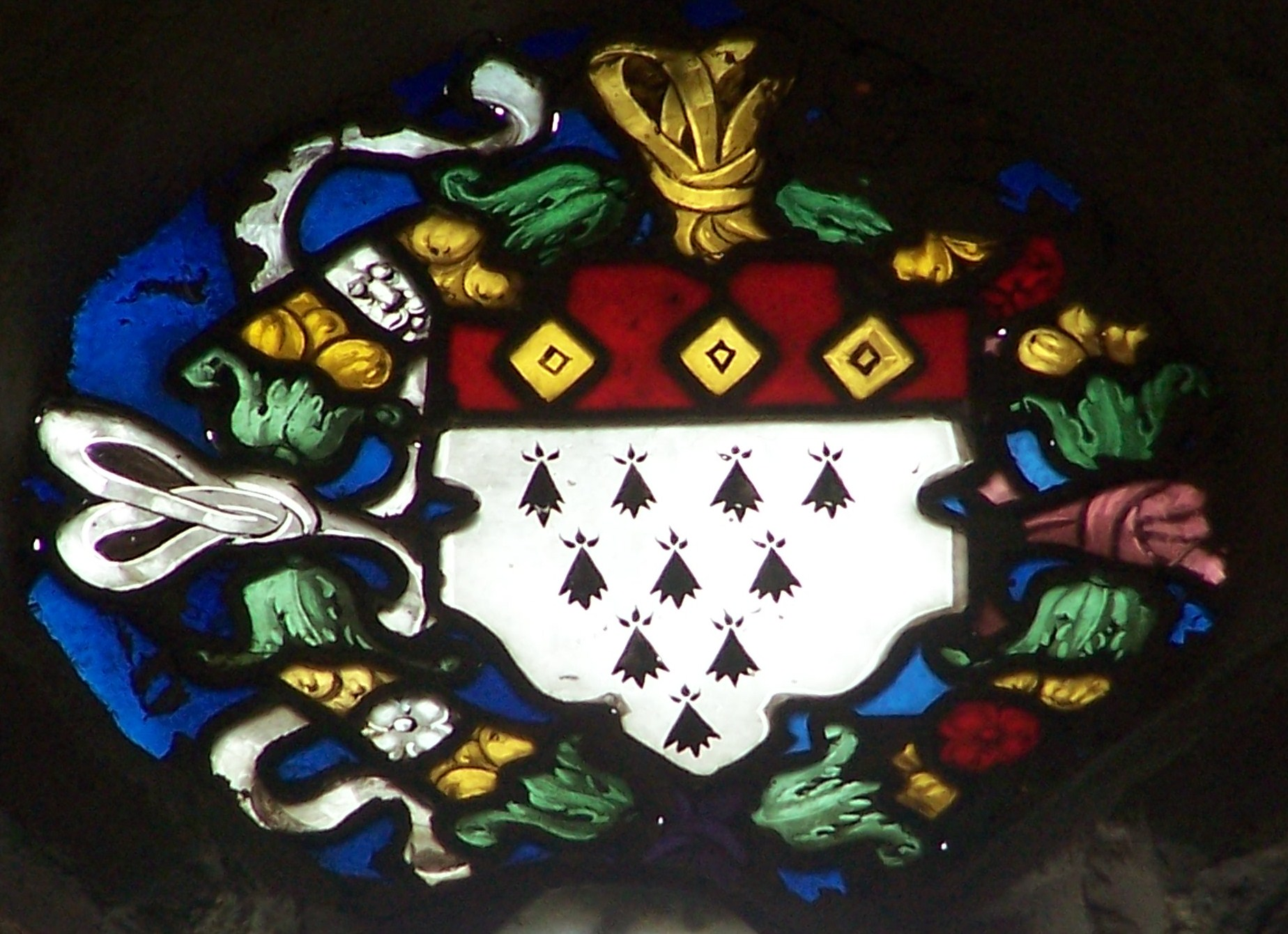 Détail du vitrail de la Chapelle en Gausson - blason de Boisboissel